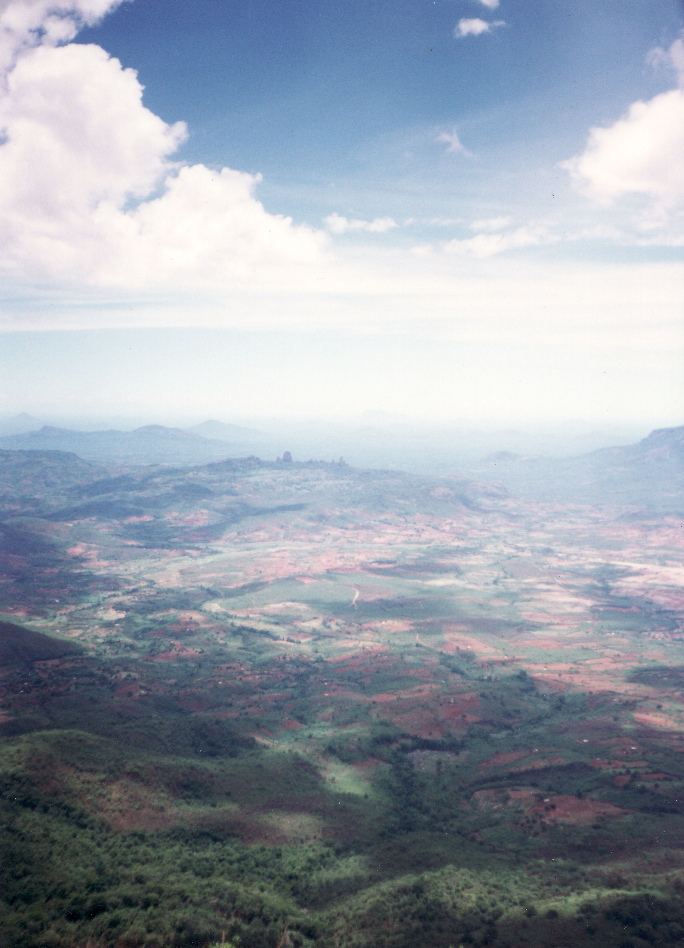 Honde Valley, Zimbabwe December 1995